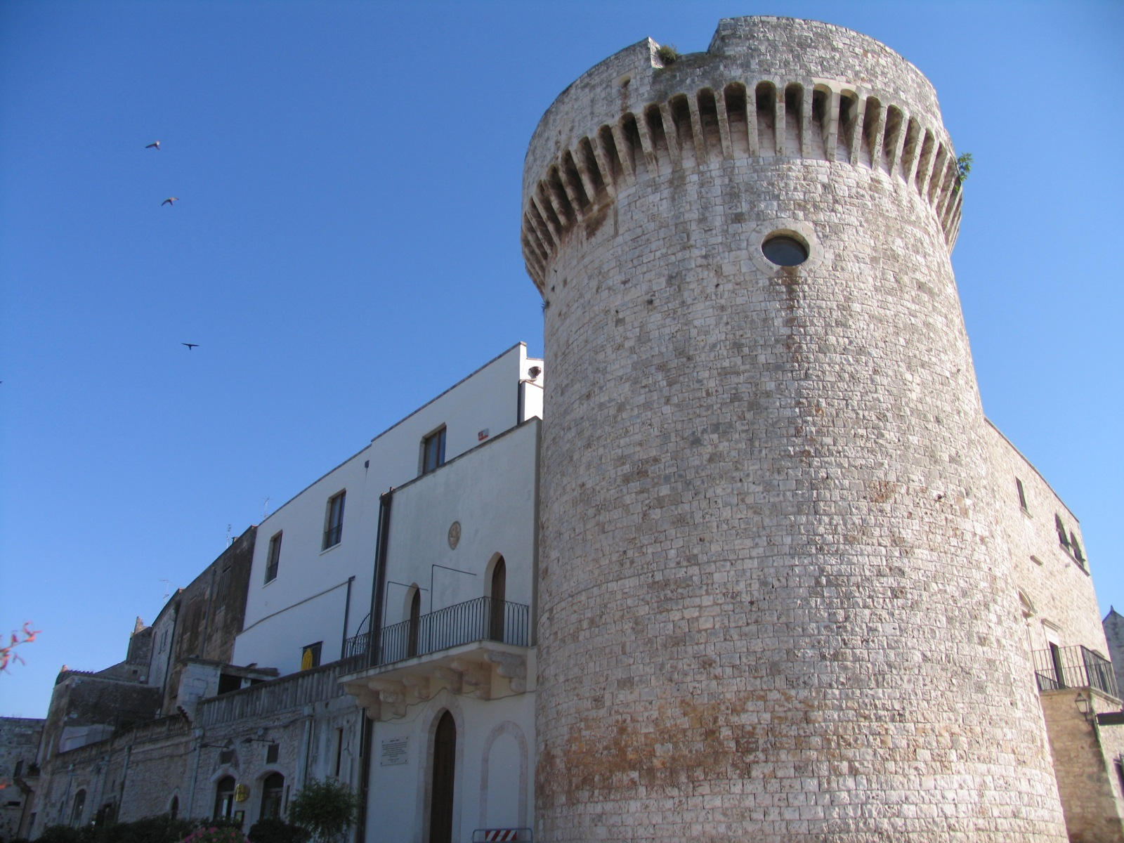 Conversano, Puglia, Italia